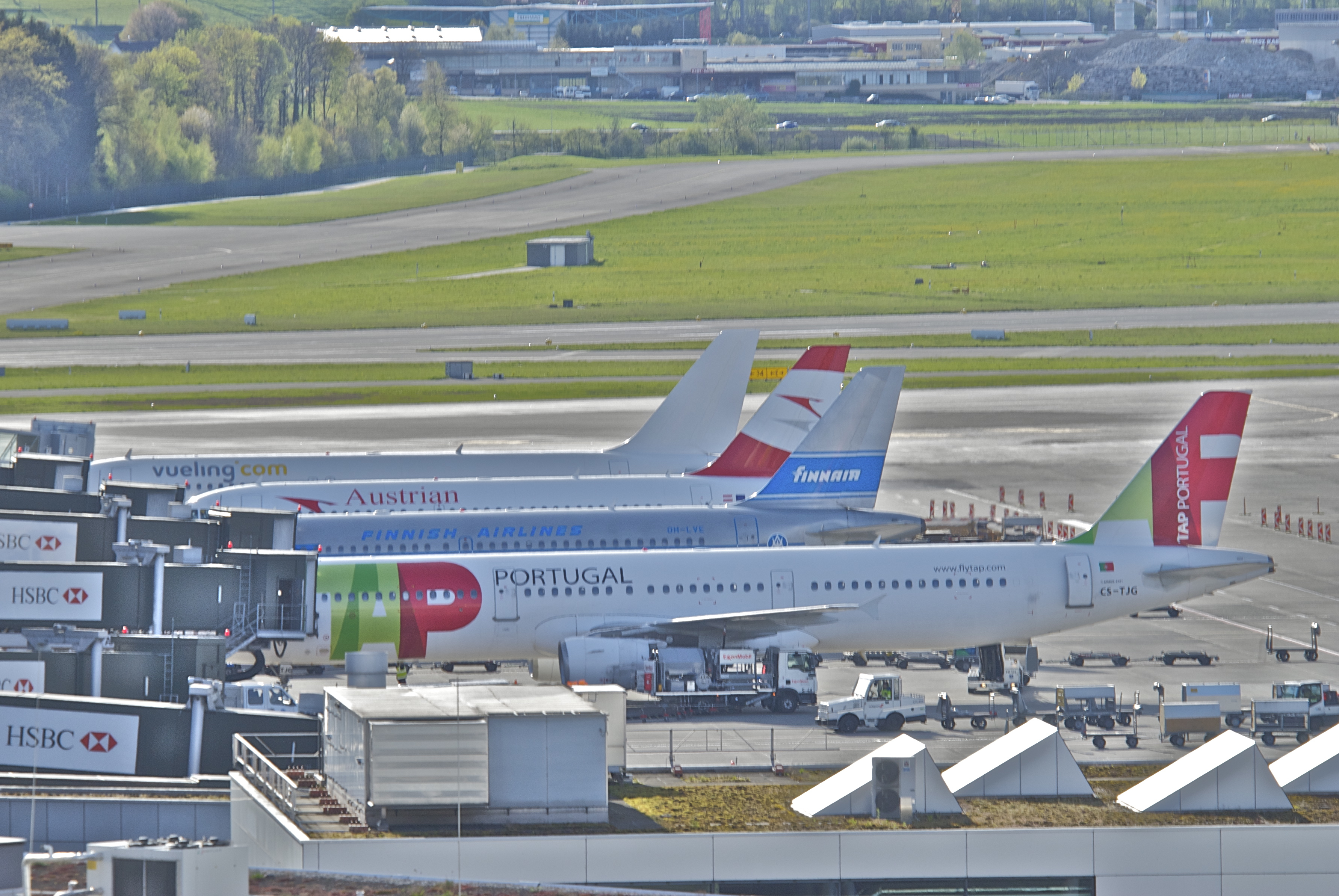 TAP Air Portugal Airbus A321-211; CS-TJG@ZRH;22.04.2012/648ds